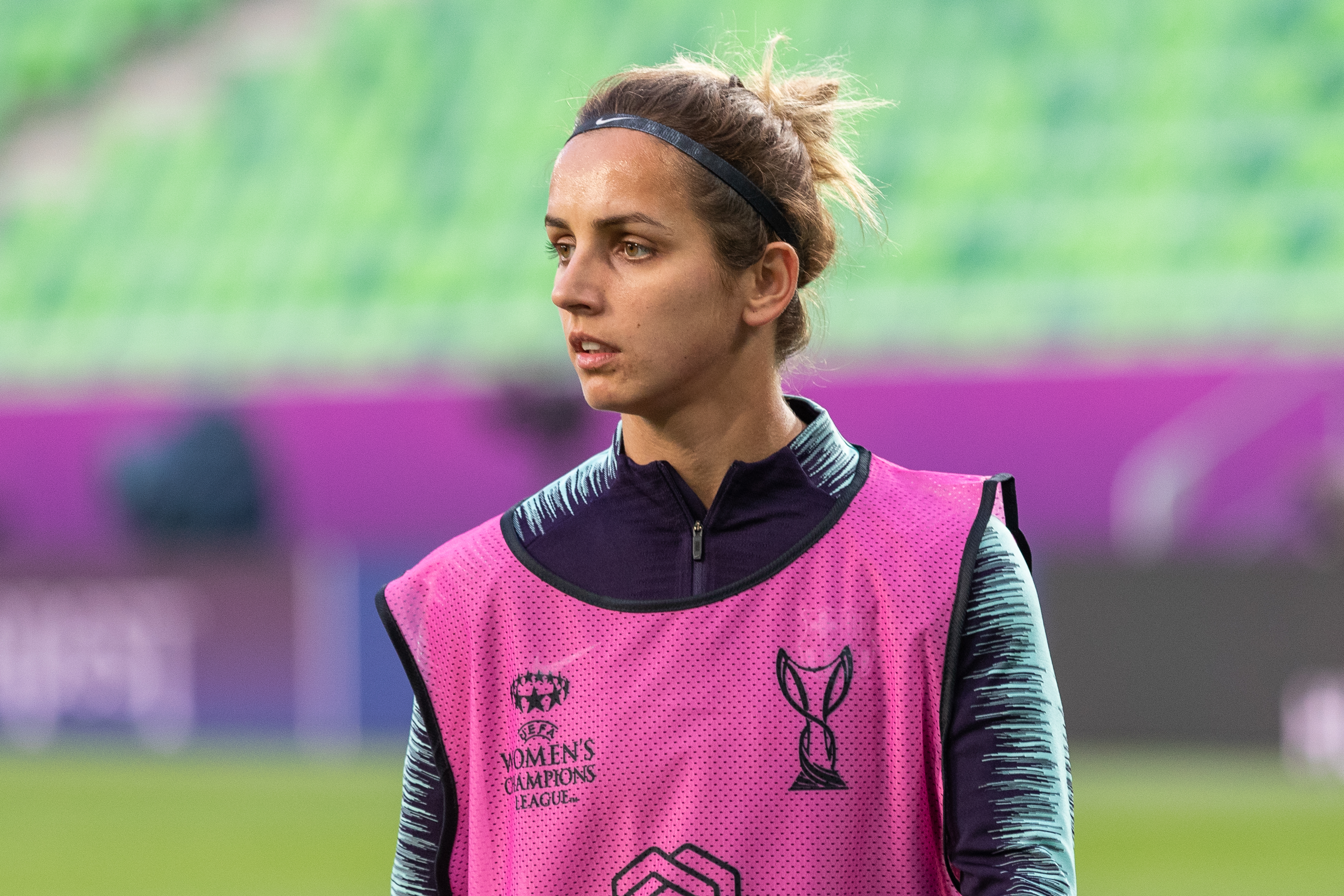 Natasha Andonova (FC Barcelona, 21) beim Abschlusstraining